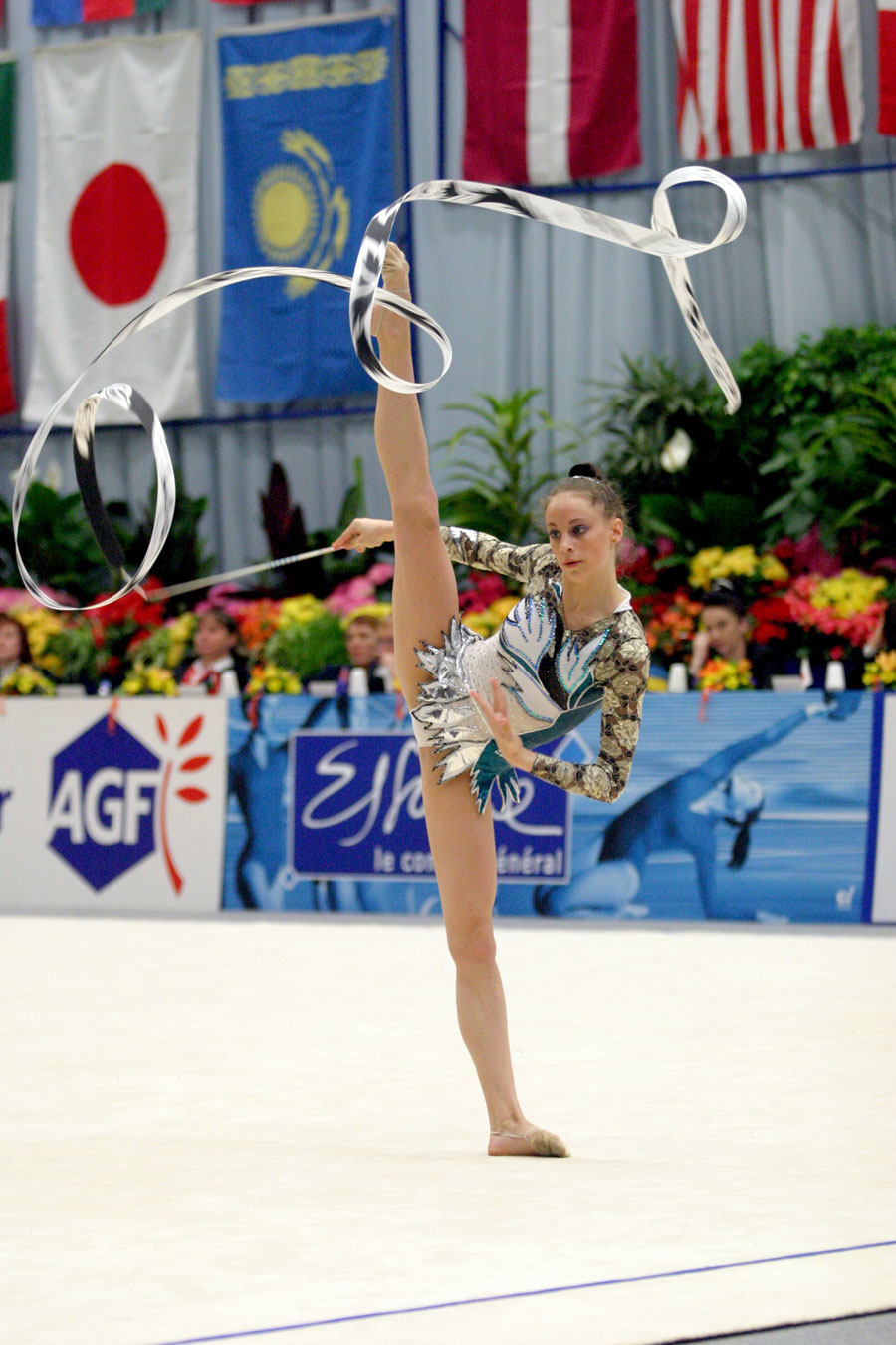 Corbeil-Essonnes (France) - 10 mai 2003